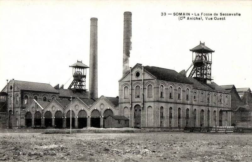 Photo de la fosse De Sessevalle vers les années 1950.